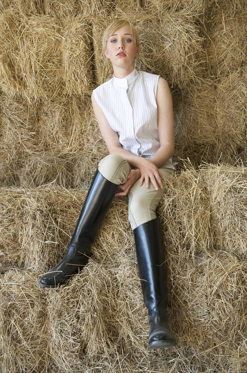 Equine Boutique location